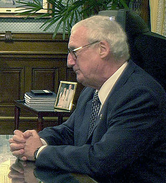 Casa Rosada - El presidente Néstor Kirchner recibe al Canciller Bielsa y al General Balza.